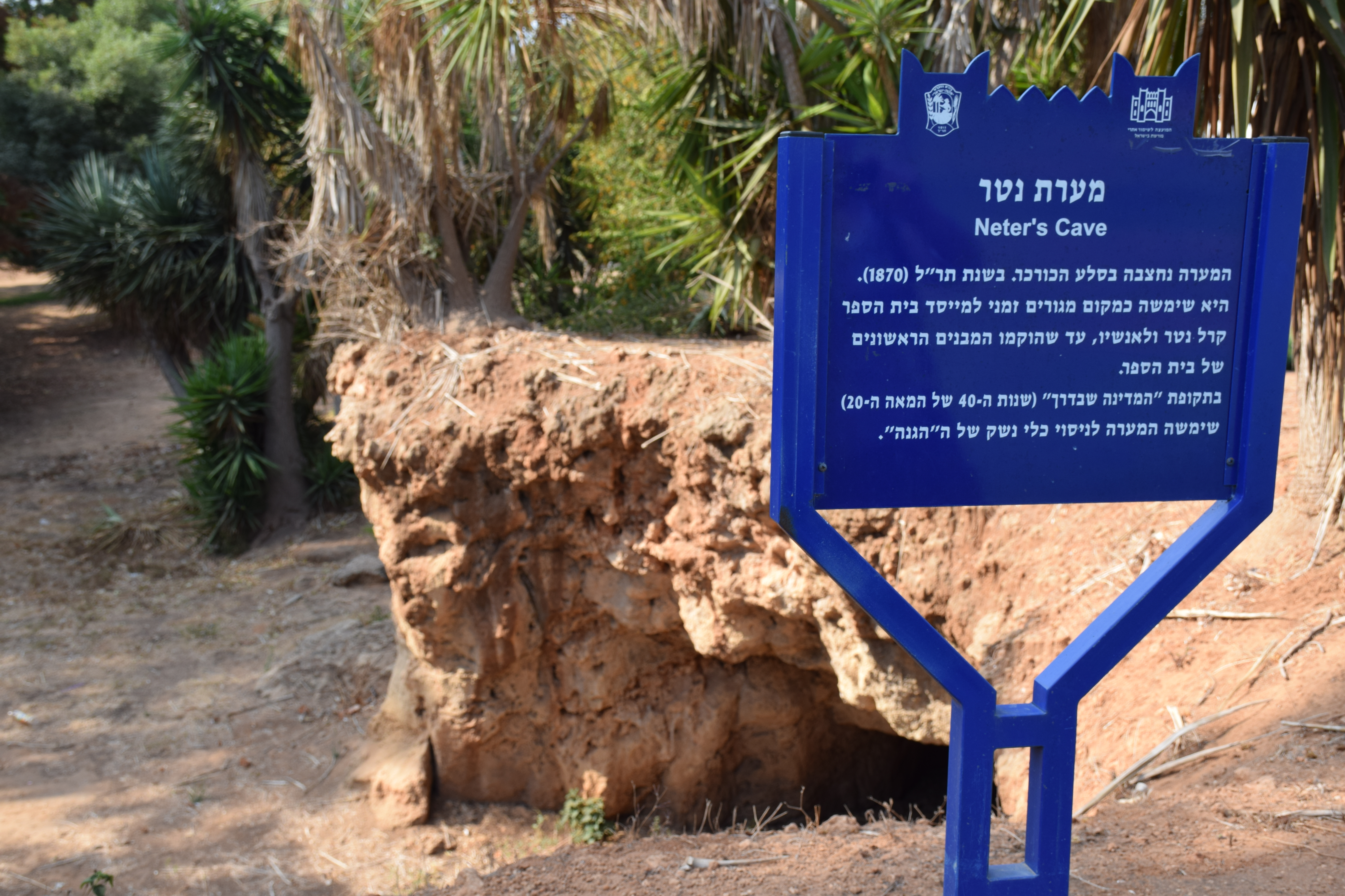 מערת נטר-מקווה ישראל